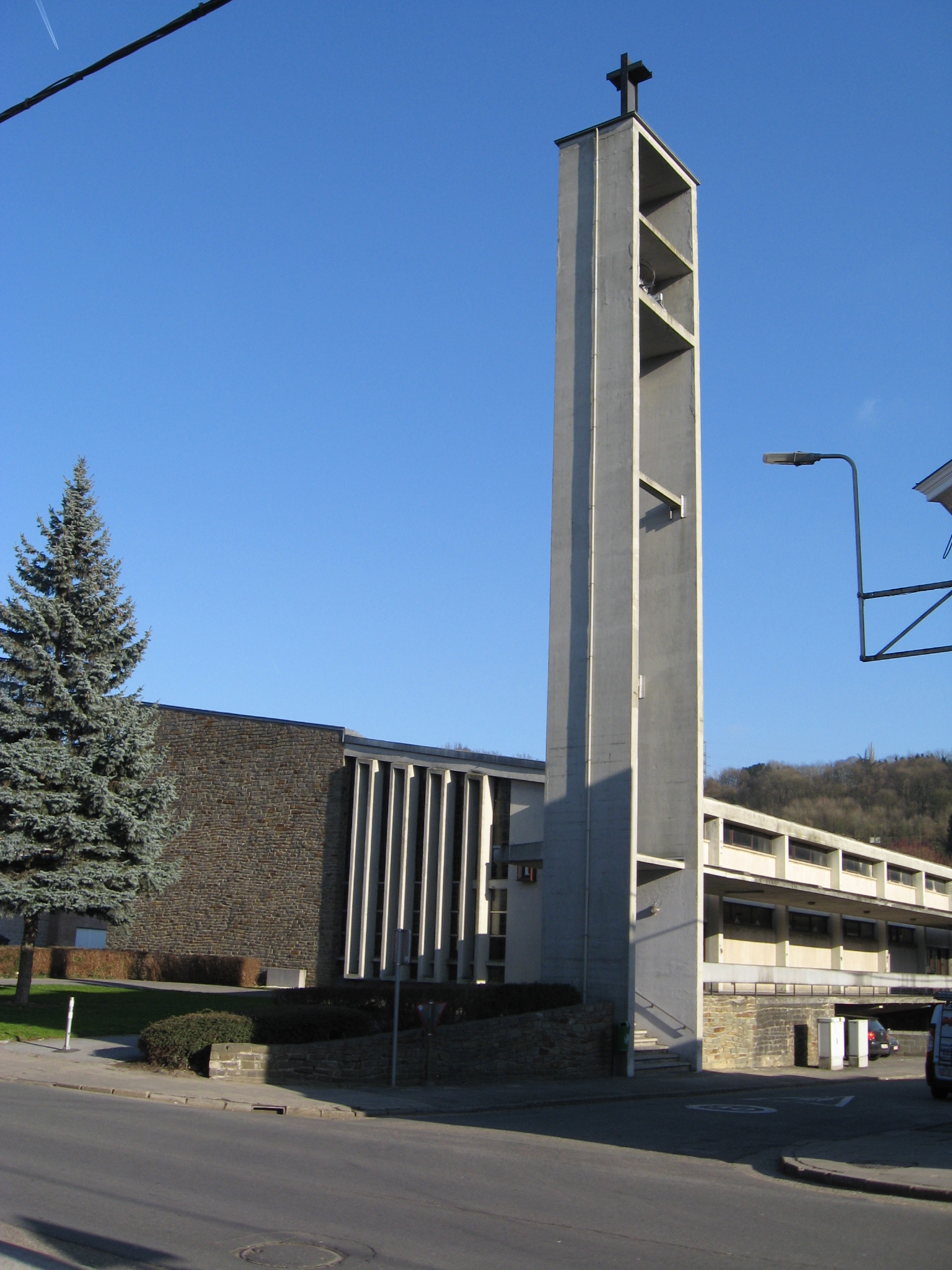 Heilige Maagd Mariakerk in Vaux-sous-Chèvremont, Chaudfontaine